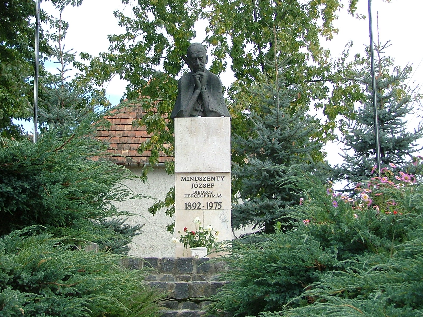 Mindszenty Denkmal in Csehimindszent